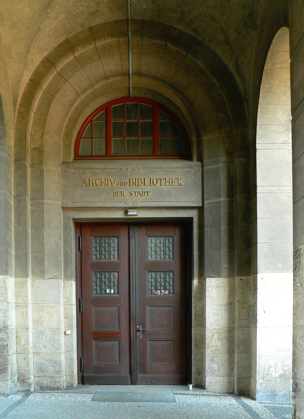 Stadtarchiv Braunschweig Steintorwall